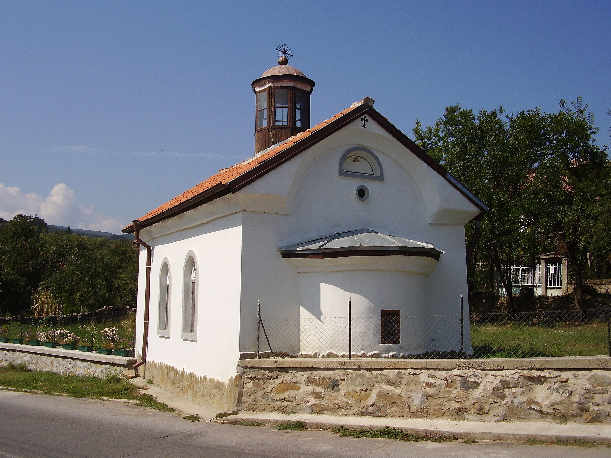 Църква "Св.Атанасий" - с.Соволяно